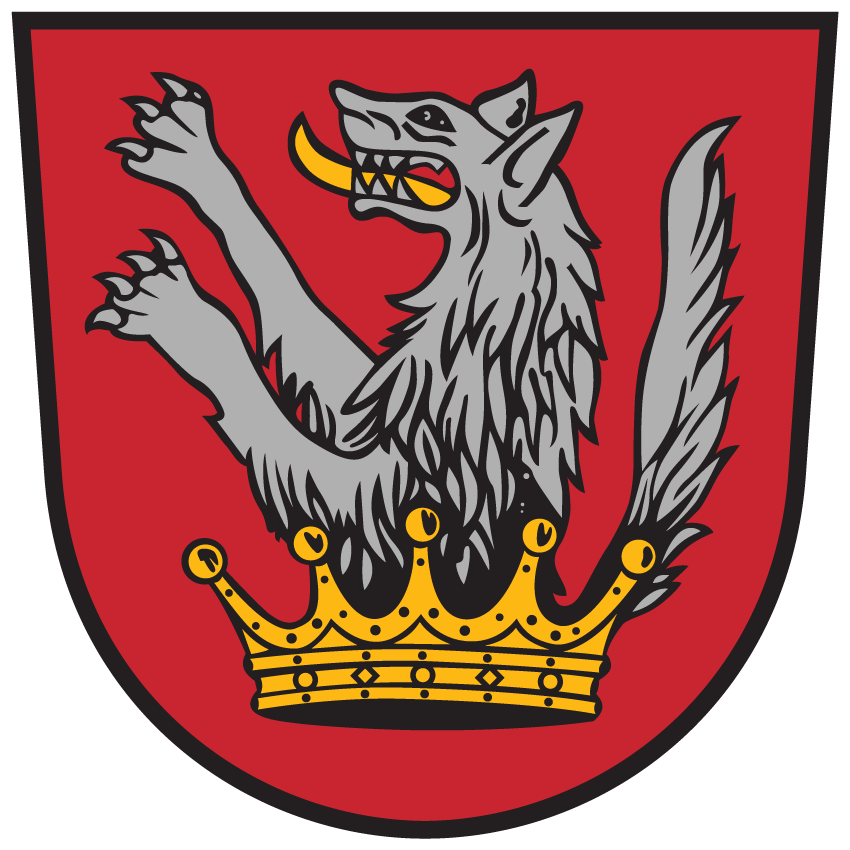 Wappen von Grafenstein